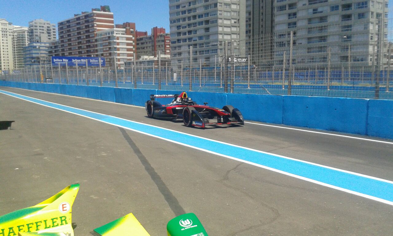 aaaaa